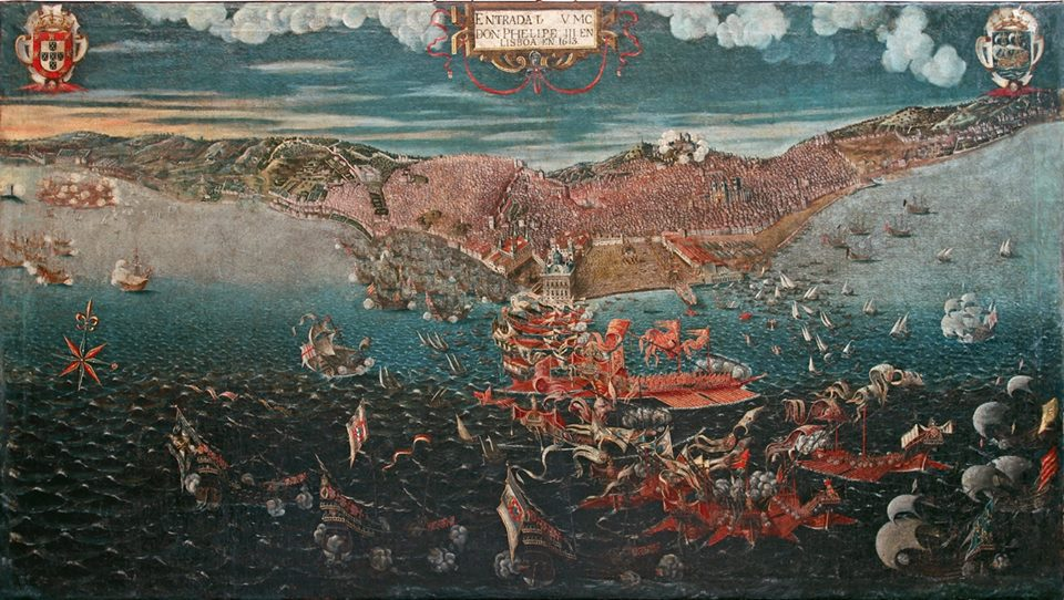 Vista da cidade de Lisboa arranjada para a entrada triunfal do rei Filipe II em Lisboa, no ano de 1619.